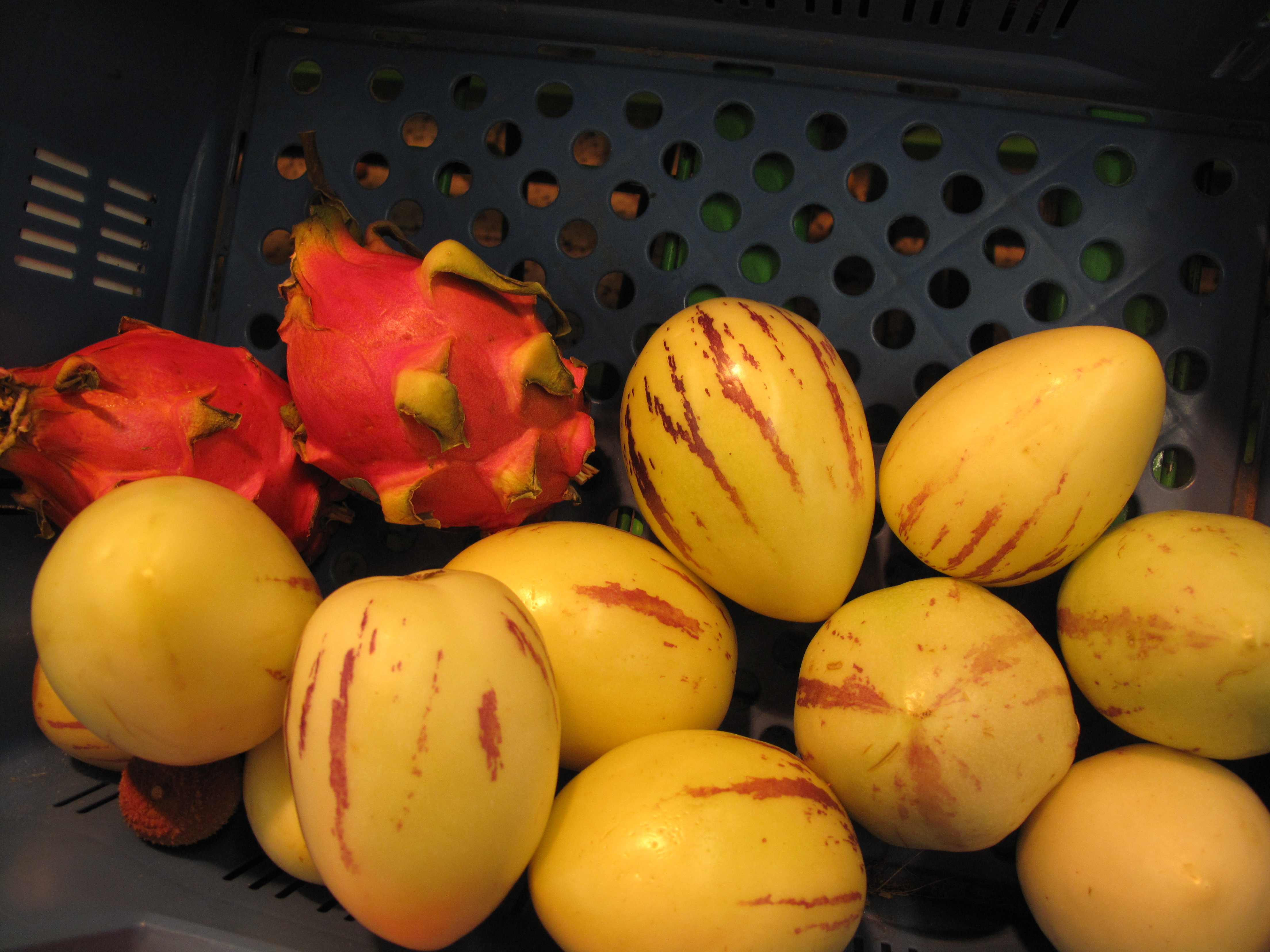 Pepino v obchodě